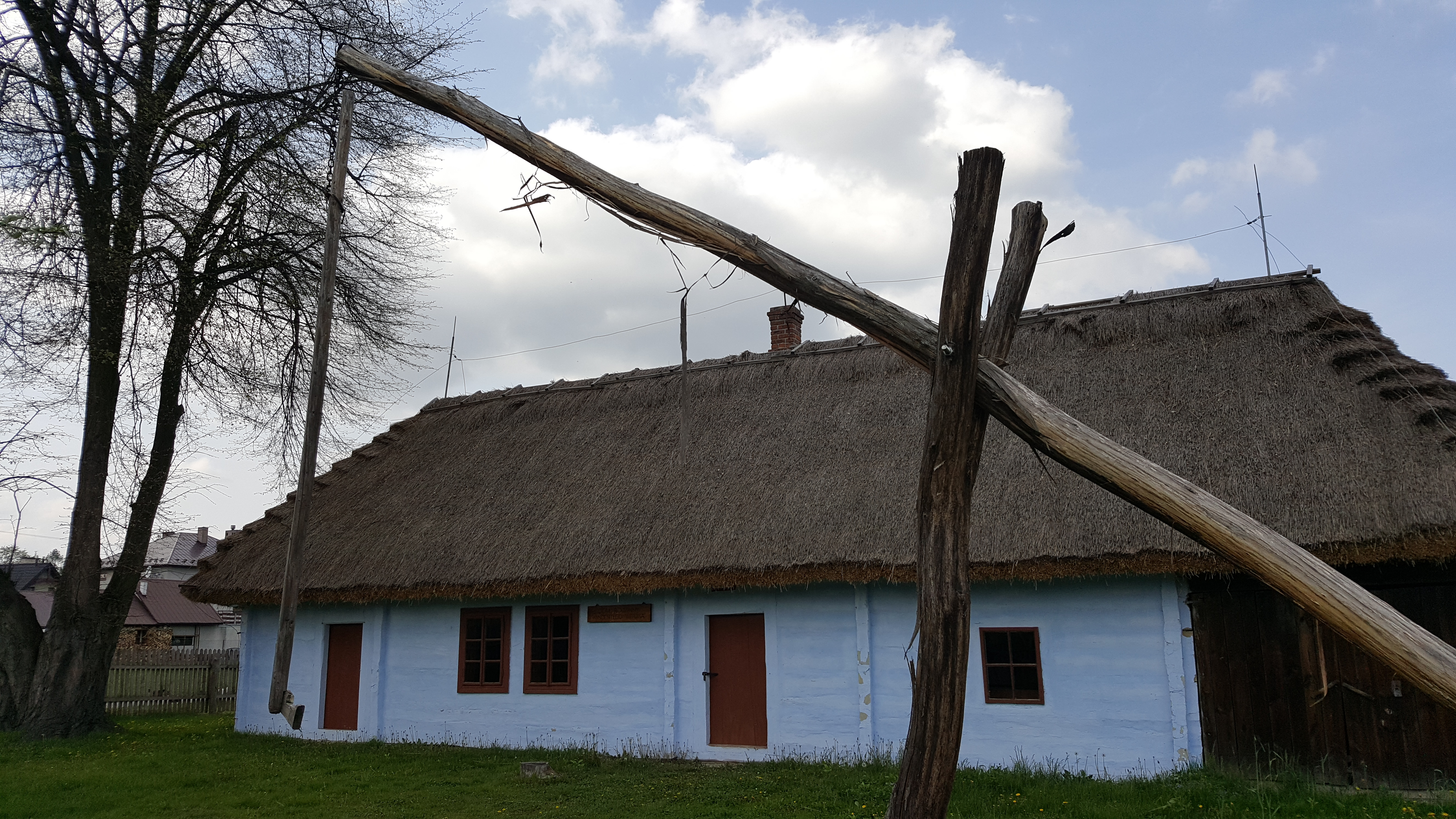 Stary dom Witosów w Wierzchosławicach. Miejsce, w którym urodził się Wincenty Witos. Obecnie część muzeum.